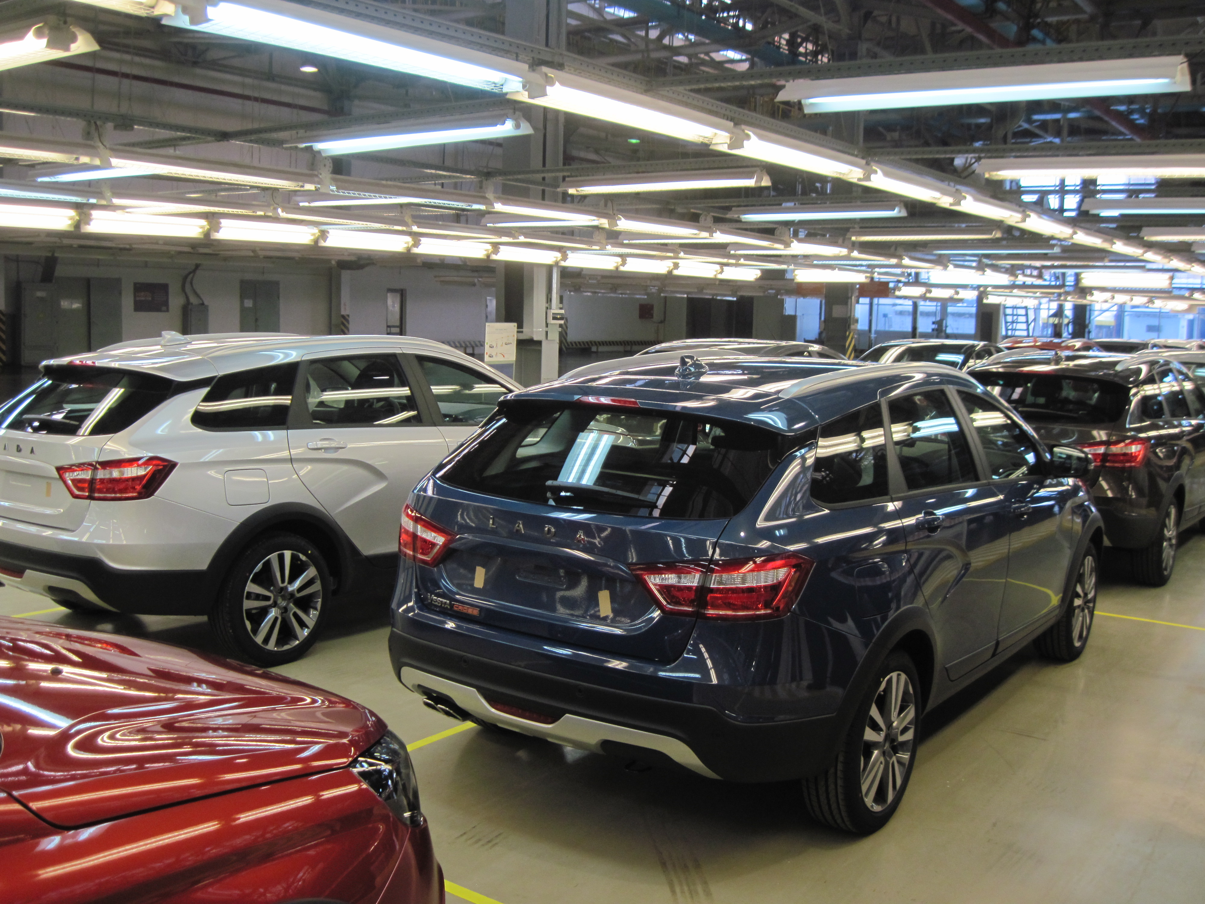 Ижевский автозавод.Зона отгрузки готовых изделий.